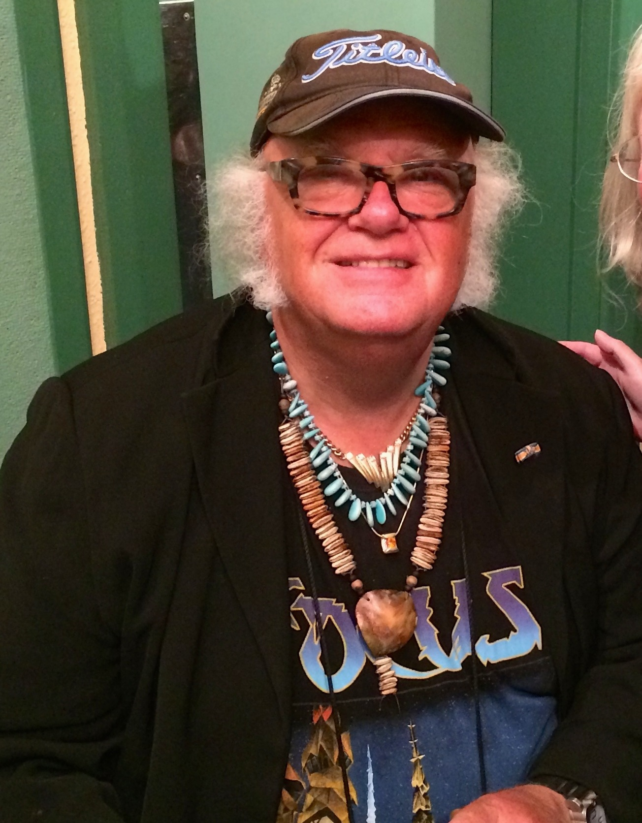 Thijs van Leer on 10 May 2014.